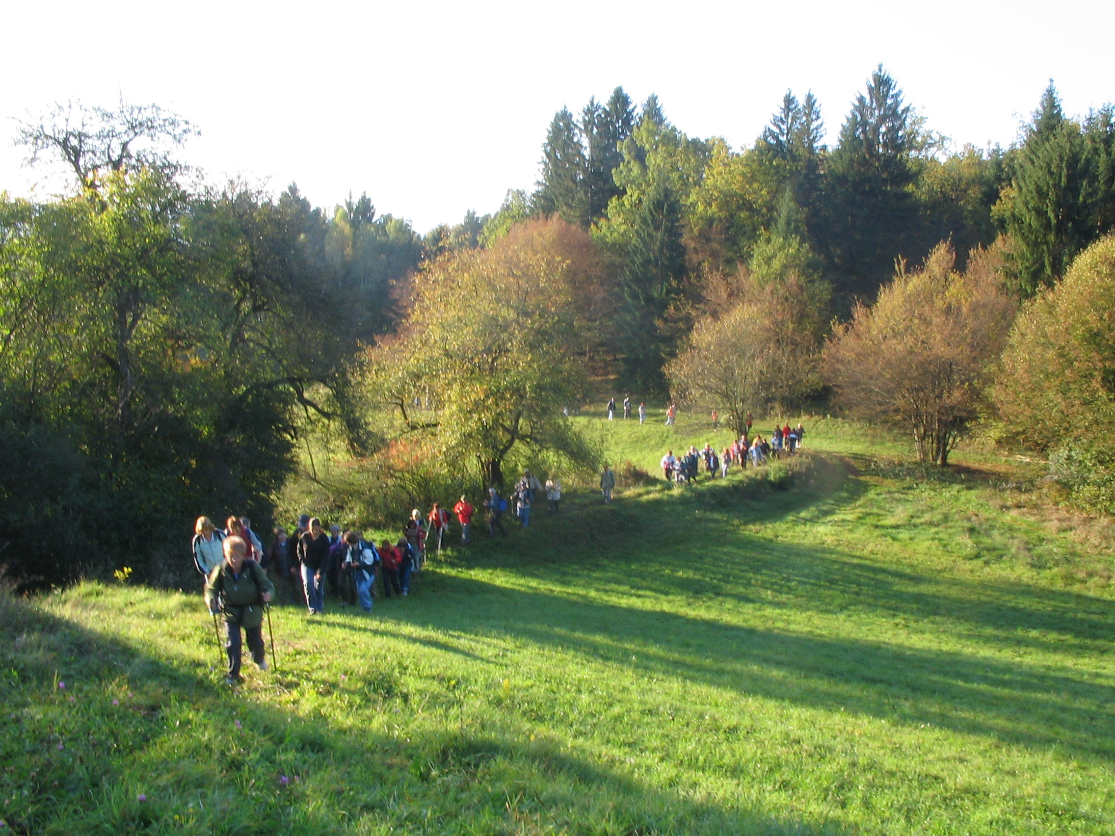 Pohodniki po poti Mare Rupena